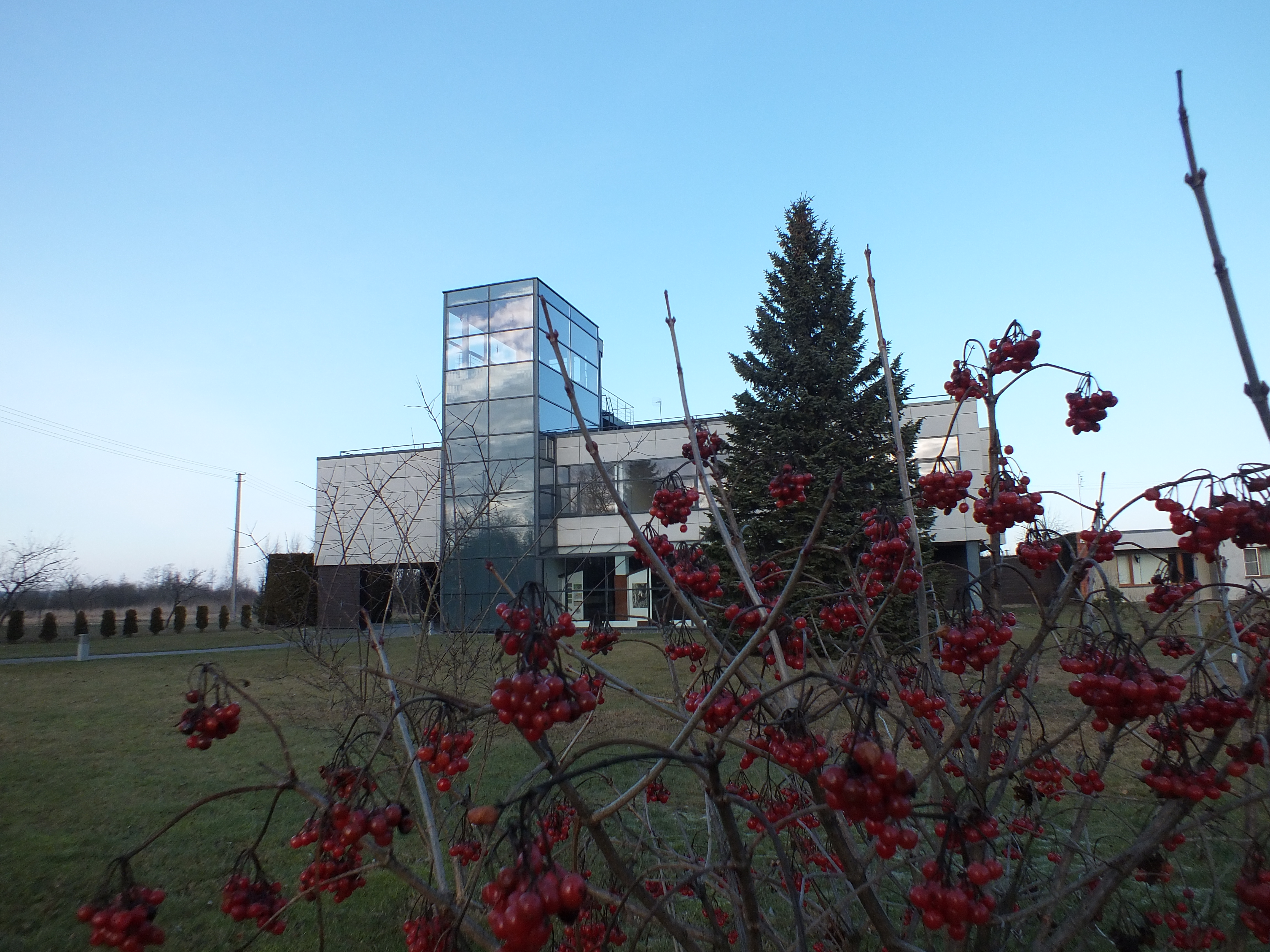 Žuvinto rezervato administracijos pastatas